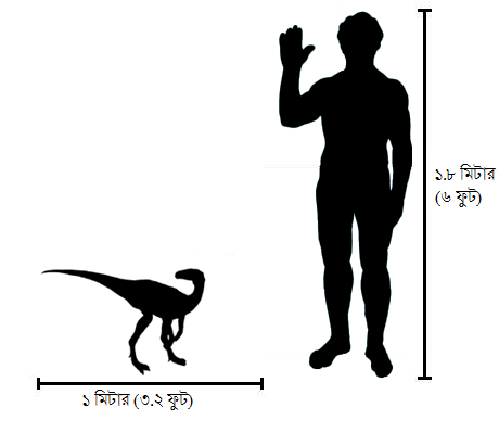 আদিম সরোপডোমর্ফ ডাইনোসর ইওর‍্যাপ্টরের সাথে একজন মানুষের গড় আয়তনের তুলনামূলক চিত্র।